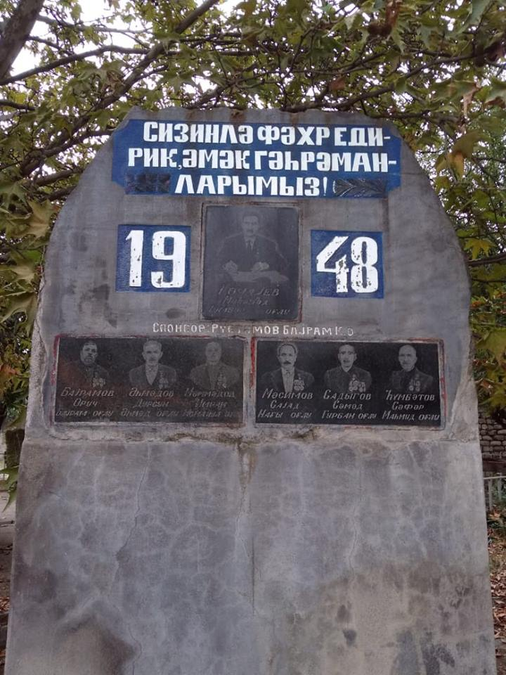 Qacağan kəndinin Əmək qəhrəmanları